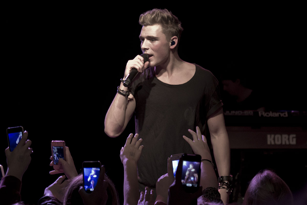 Sangeren Christopher ved en koncert på spillestedet Forbrændingen 30/11-12